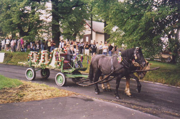 Glockenweihe in Malšín 2001 Böhmerwald